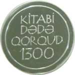 1999-cu ildə “Kitabi-Dədə Qorqud” dastanının 1300 illiyinə həsr olunmuş 50 Manat dəyərində gümüş xatirə sikkələri buraxılmışdır.